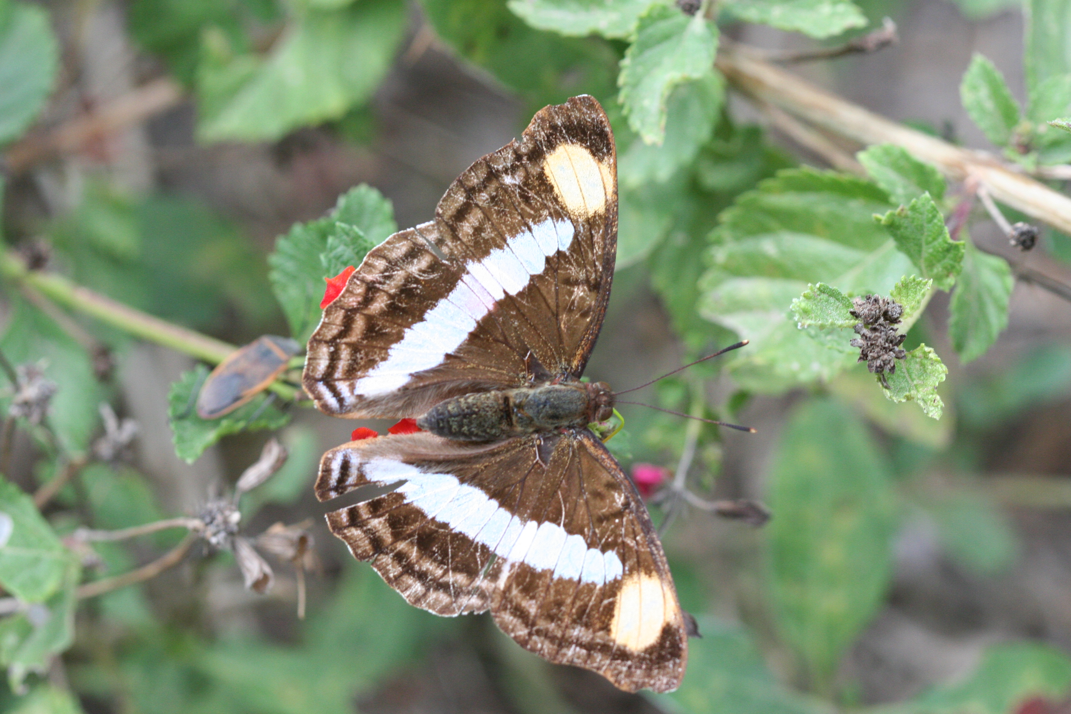 Pavon Emperor (Doxocopa pavon) female